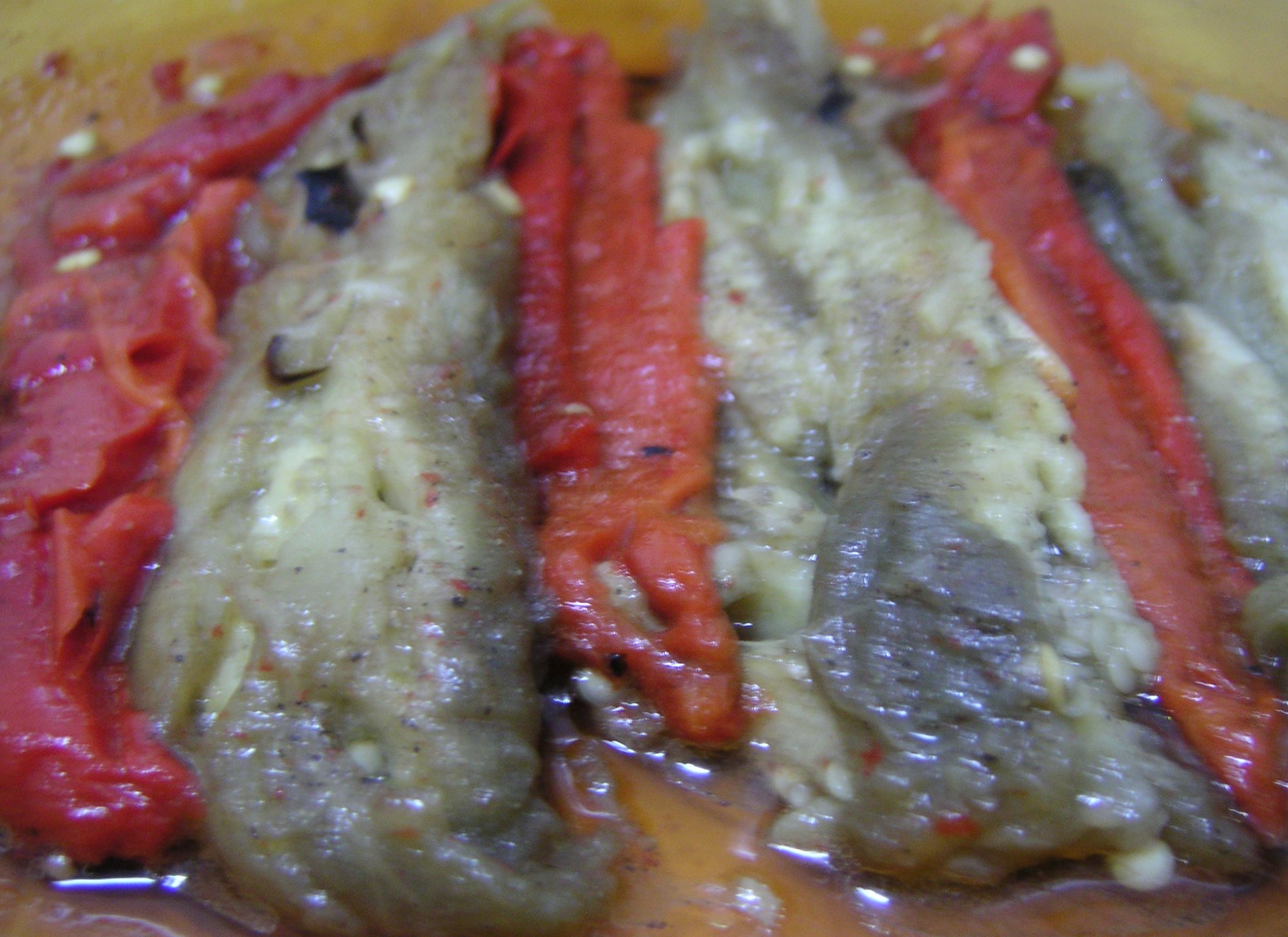 Escalivada